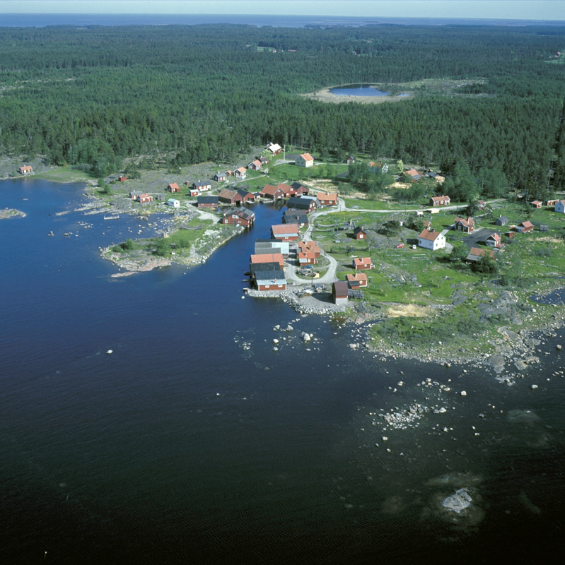 Fiskehamnen från norr. Motiv: Fågelsundets fiskehamn Nyckelord: Flygbilder, Riksintressen Kategori: Kust- och skärgårdsmiljö, Fiskeläge Fiskehamnen från norr.